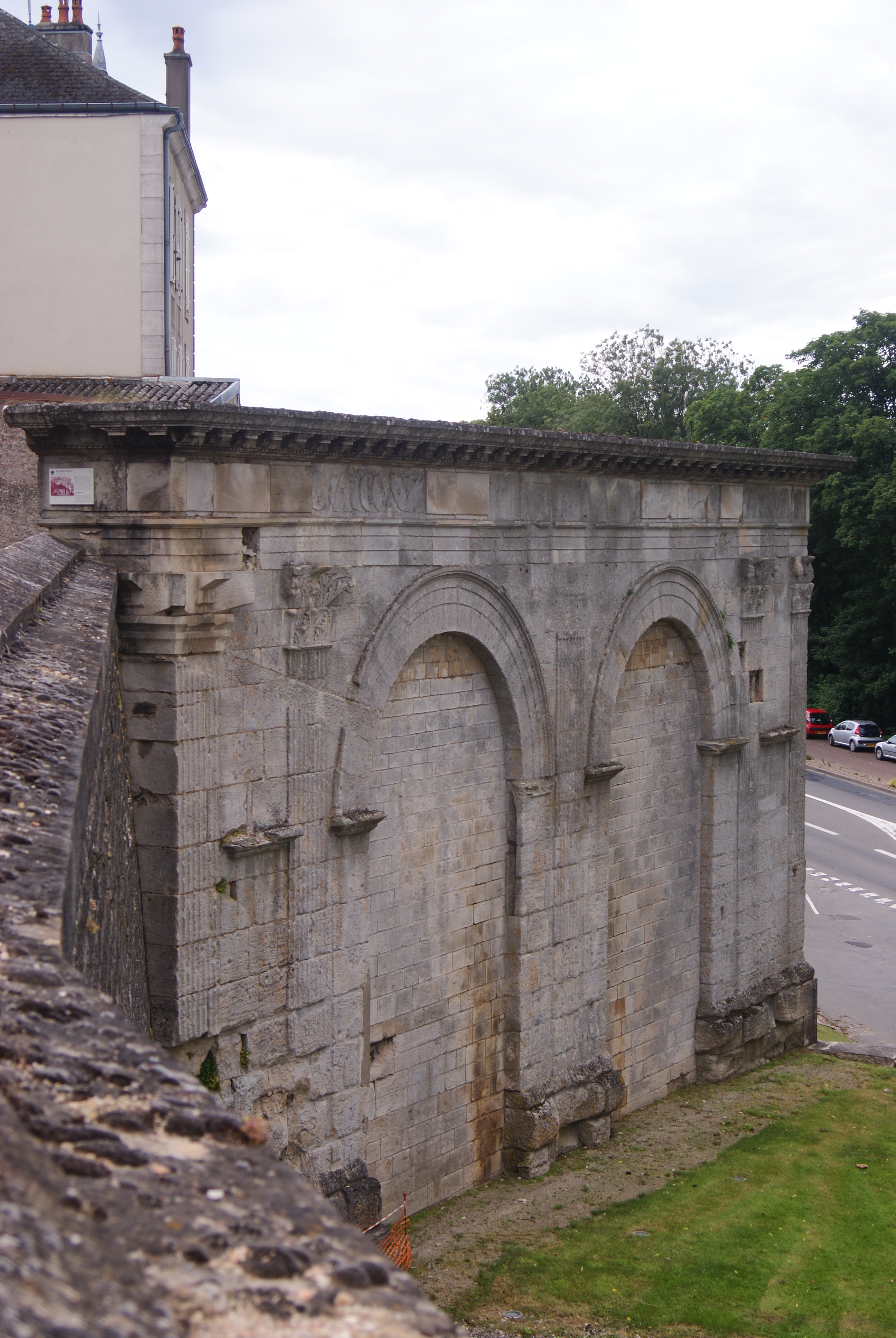 Langres Andemantunnum